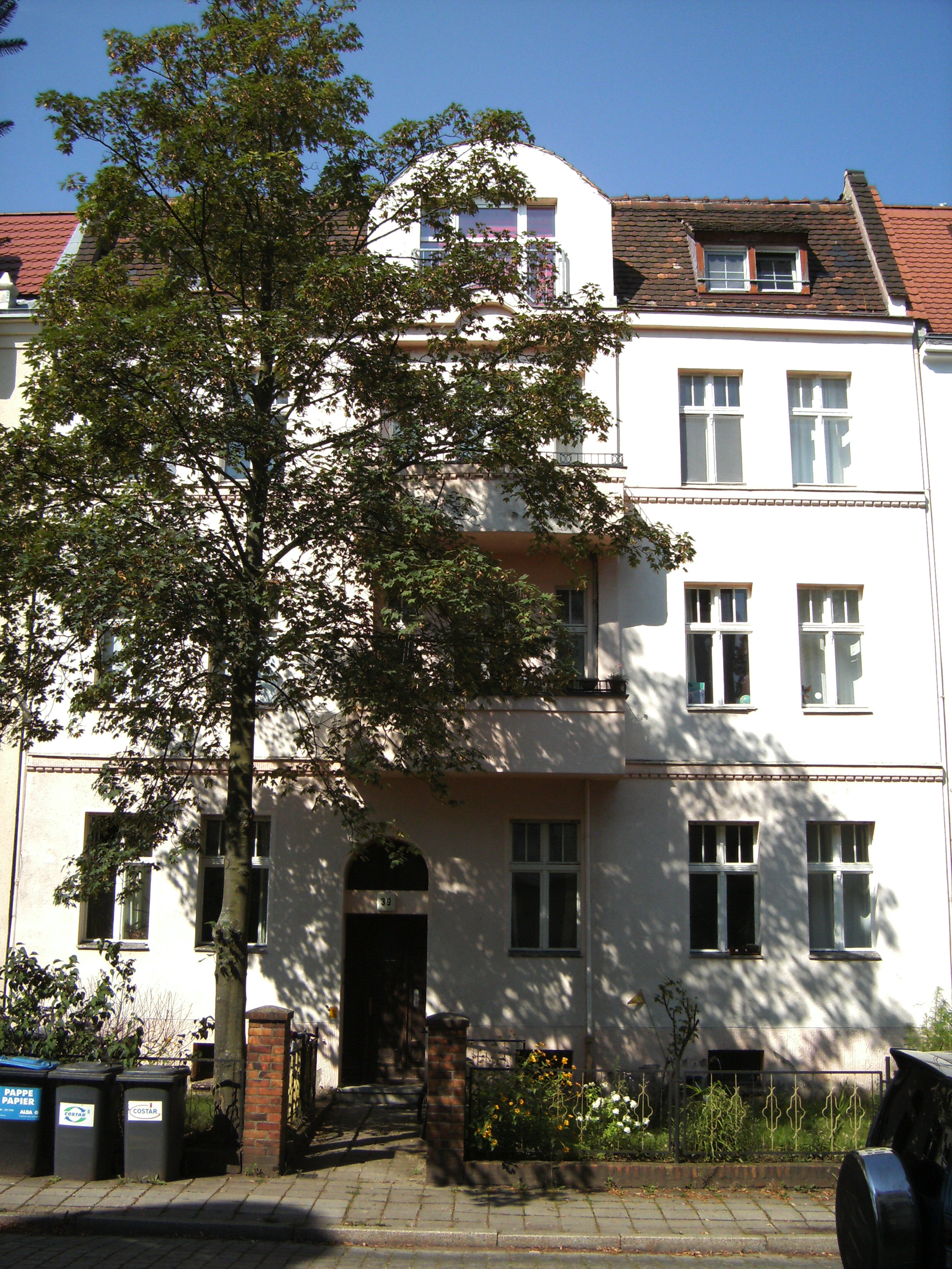 Wernerstr. 39